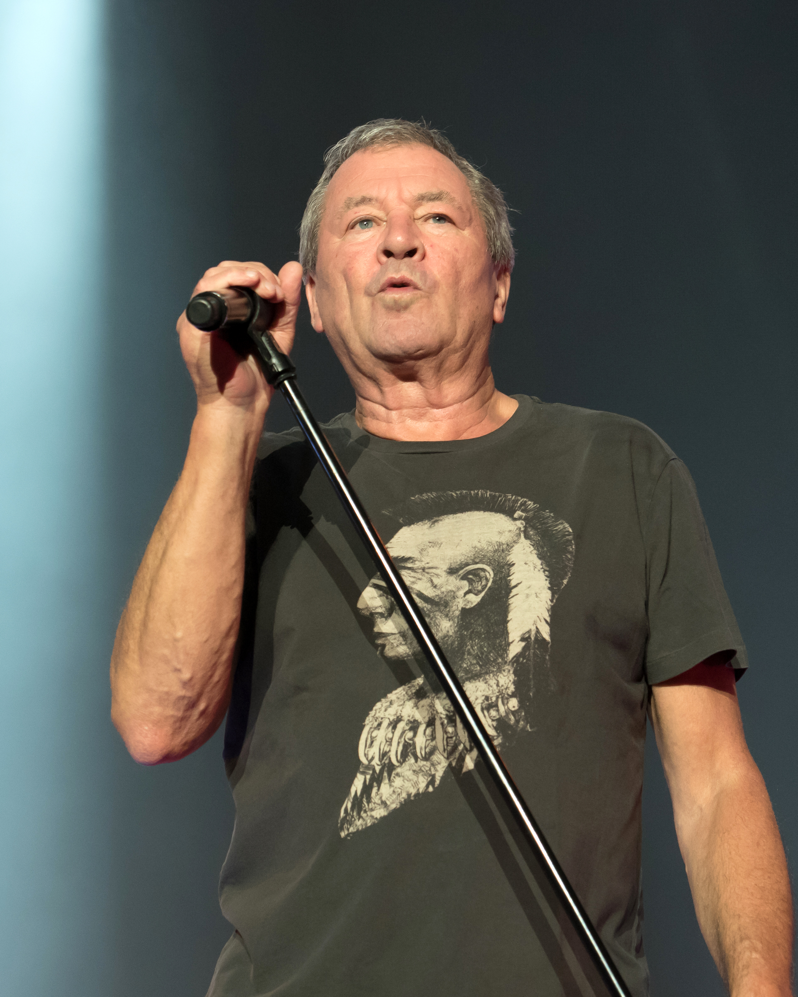 Ian Gllan von Deep Purple bei der inFinite "The Long Goodbye Tour" in der Barclaycard Arena in Hamburg 2017